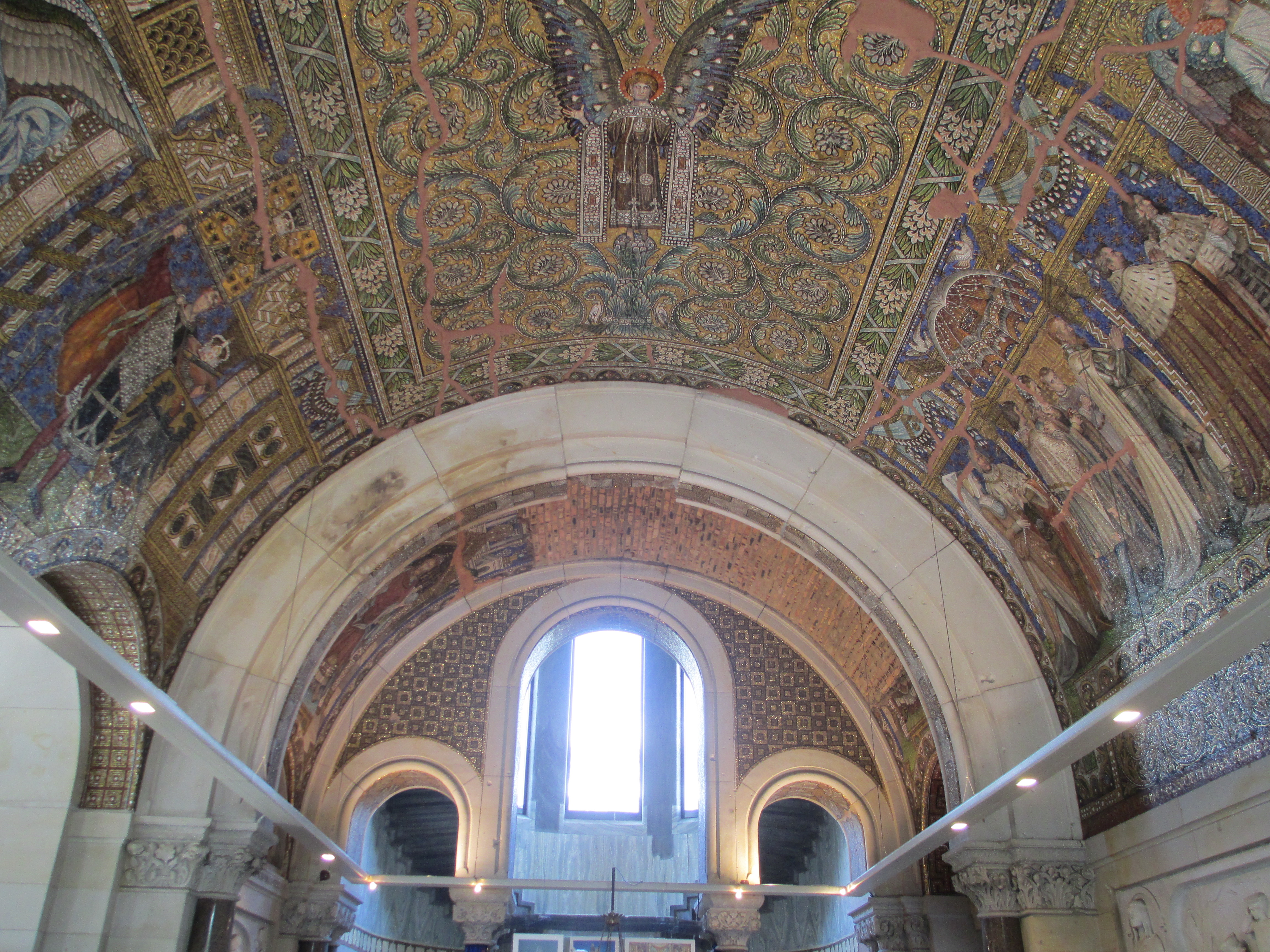 כנסיית הזיכרון הישנה על שם קייזר וילהלם